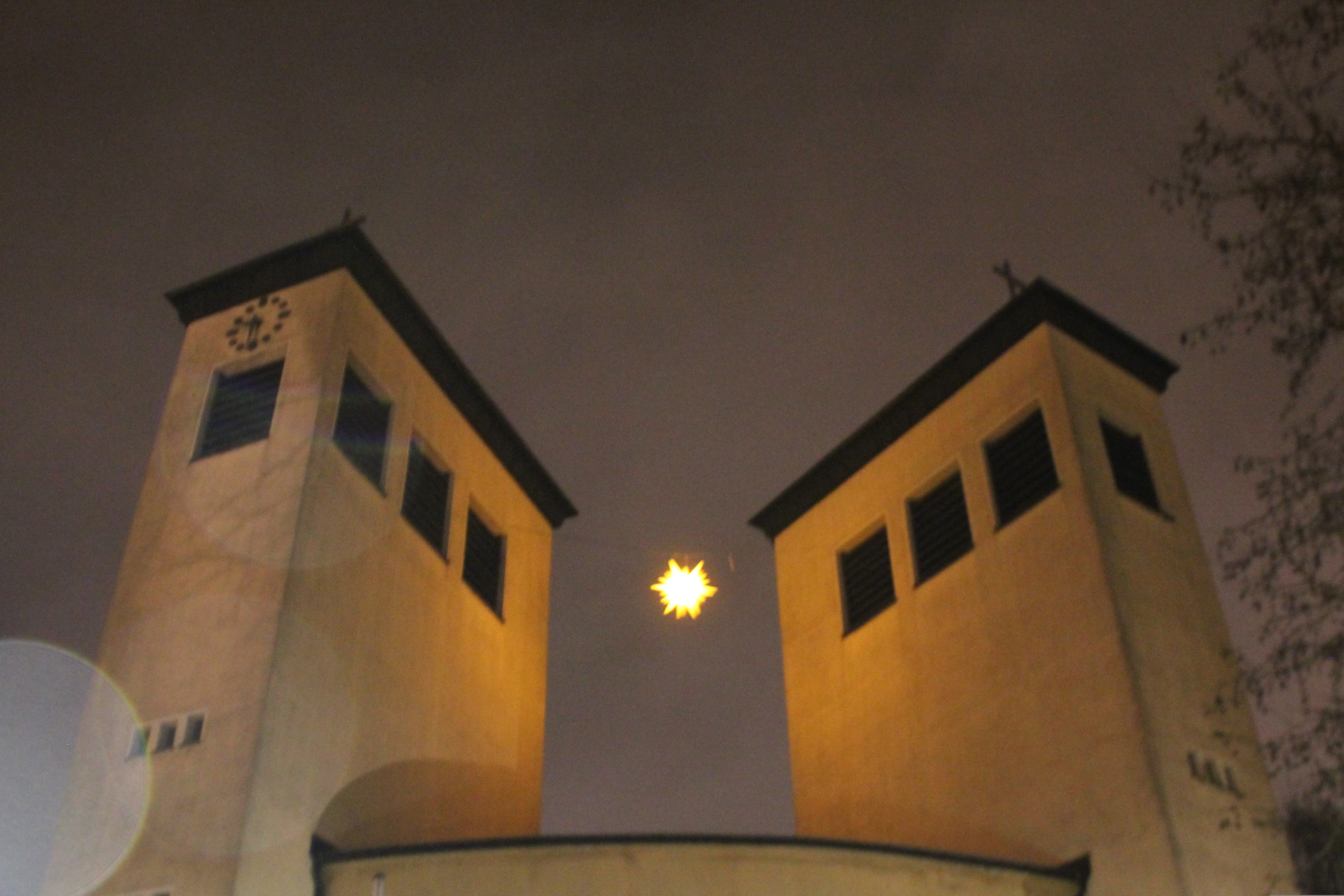 Essen, Kirche St. Fronleichnam: Der Stern leuchtet weit in Bochold und zeigt auf das nahende Weihnachtsfest